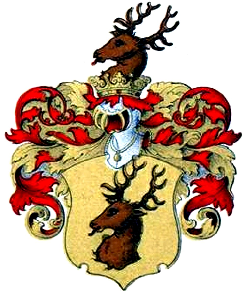 Zur Mühleni suguvõsa aadlivapp